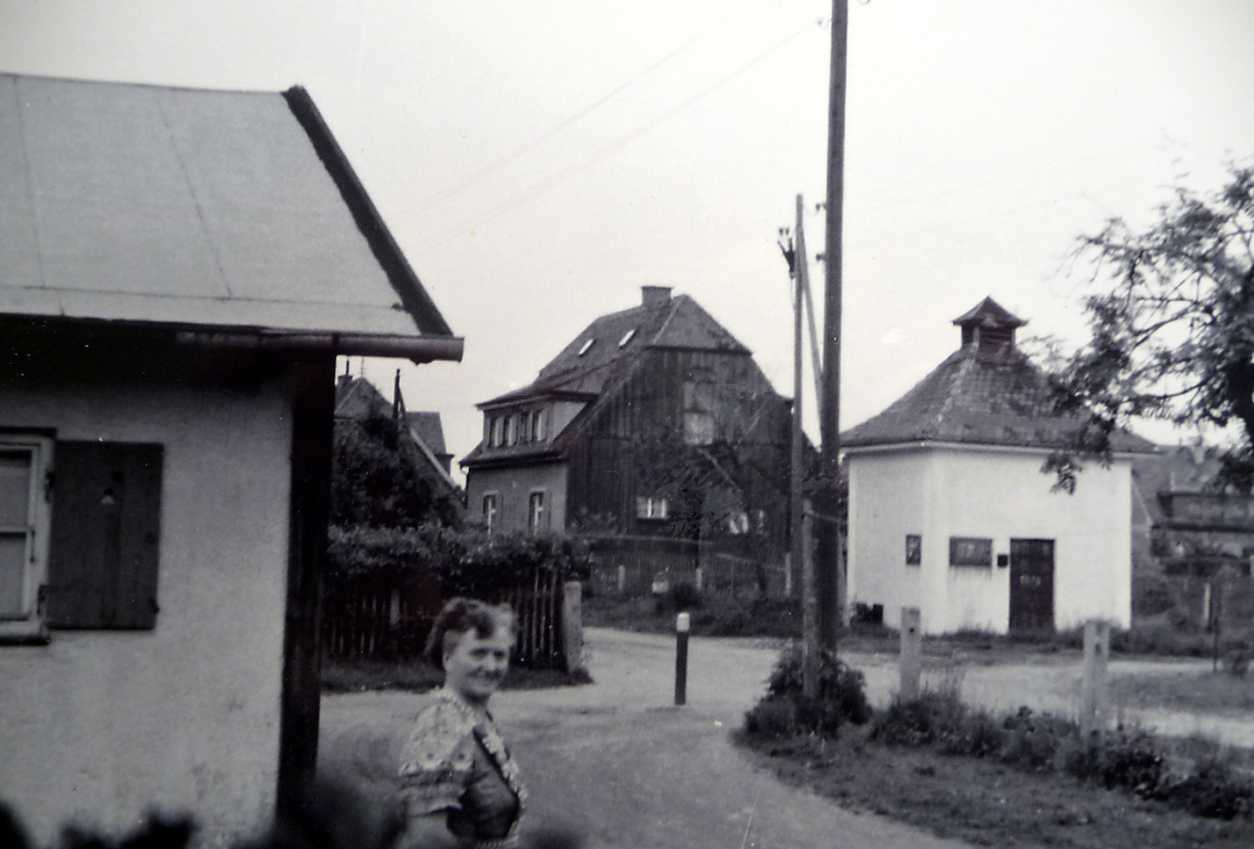 Blick auf die ehemalige "Siedlung Nord", Reuschstraße München-Freimann. Die Bebauung wurde ursprünglich 1922/23 für die Fritz Neumeier AG erstellt und nach deren Übernahme durch die damalige Deutsche Reichsbahn Gesellschaft 1925 als deren Werkswohnungen genutzt. Nach dem Abriss des Gebiets in den 1980er Jahren ist nur das Trafo-Häuschen (rechts) erhalten geblieben.